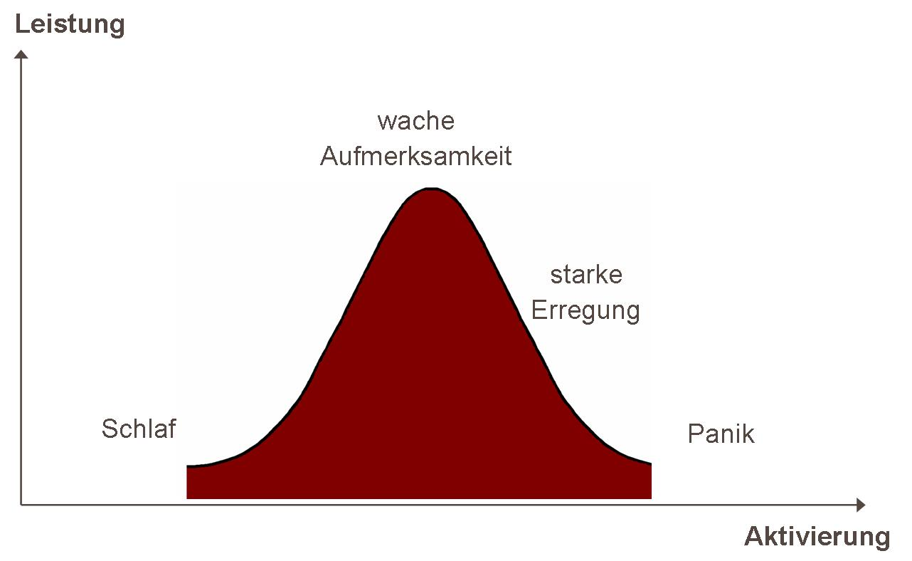 Lambda-Hypothese: Zusammenhang zwischen Aktivierung und Leistung. Erstellt für den Artikel "Aktivierung (Werbewirkungsforschung)".